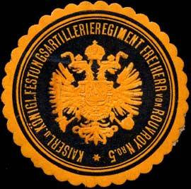 Sealing stamp Title: Kaiserl. u. Königl. Festungsartillerieregiment Freiherr von Rouvroy Nro. 5 Description: orange, schwarz, geprägt Place: size: 4 cm